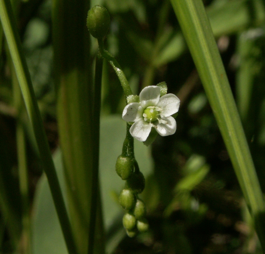 Flora Drosera rotundifolia